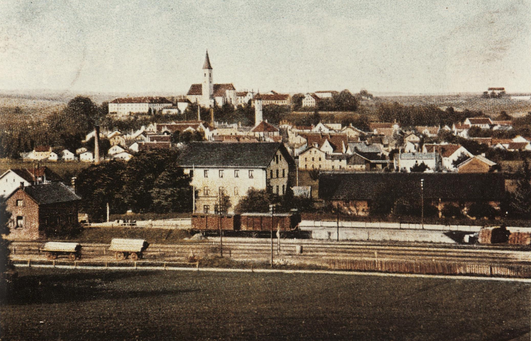 Laderampe im Westen des Bahnhofs Dorfen mit zwei gedeckten Güterwagen, links das westliche Wechselwärterhaus, in der Mitte die Bahnhofsrestauration, vor dem rechten Güterwagen einer der zwei Wasserkräne. Im Hintergrund der Markt Dorfen mit der Wallfahrtskirche Mariä Himmelfahrt auf dem Ruprechtsberg, darunter die Altstadt mit der Marktkirche St. Veit. Ansichtskarte um 1910.